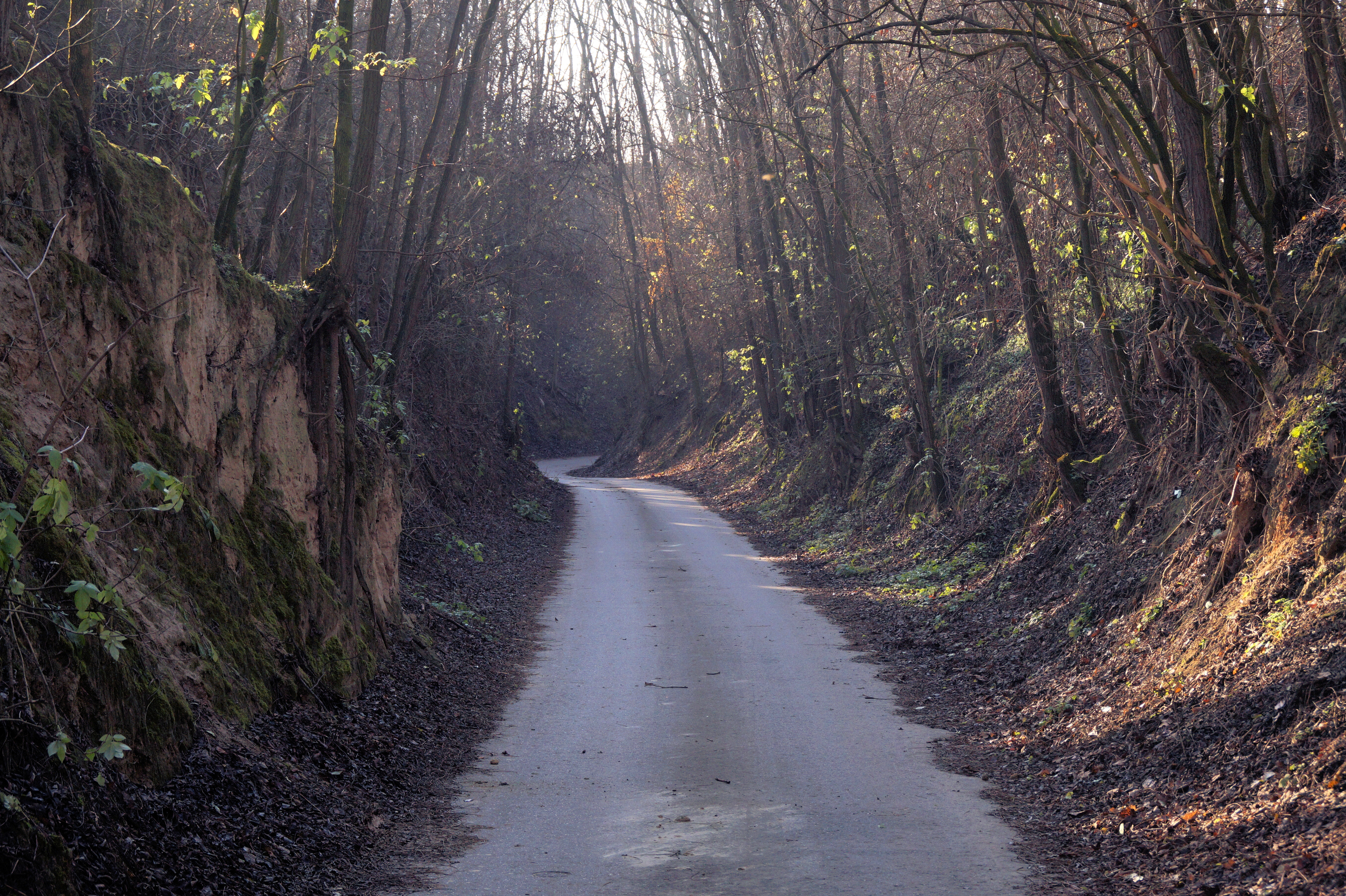 Hohlweg - Hippersdorf - Dez.2015